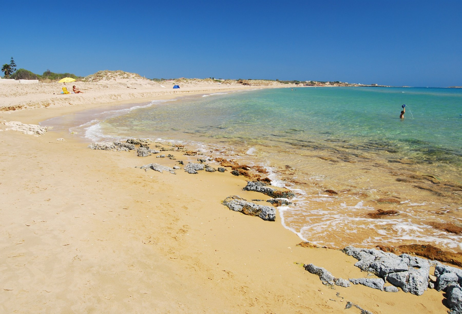 portopalo di capo passero_2